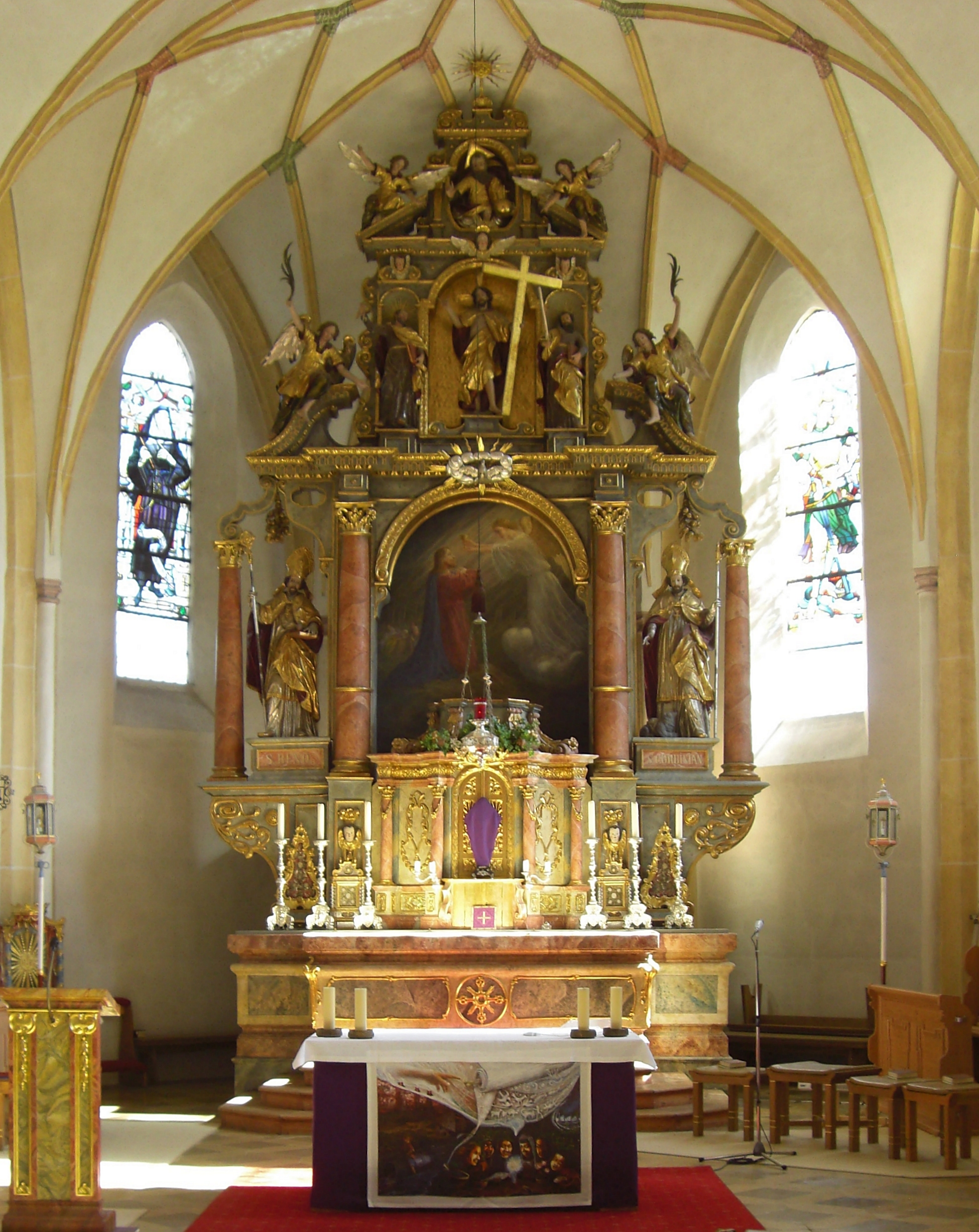 Hochaltar der Pfarrkirche St. Georg, Otterfing